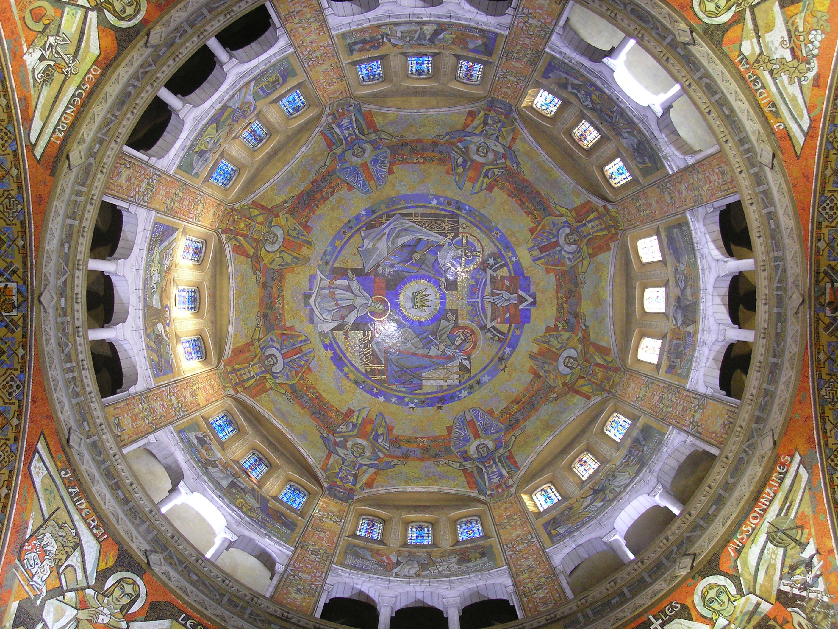 Lisieux (Normandie, France). Vue intérieure du dôme de la basilique Sainte-Thérèse.